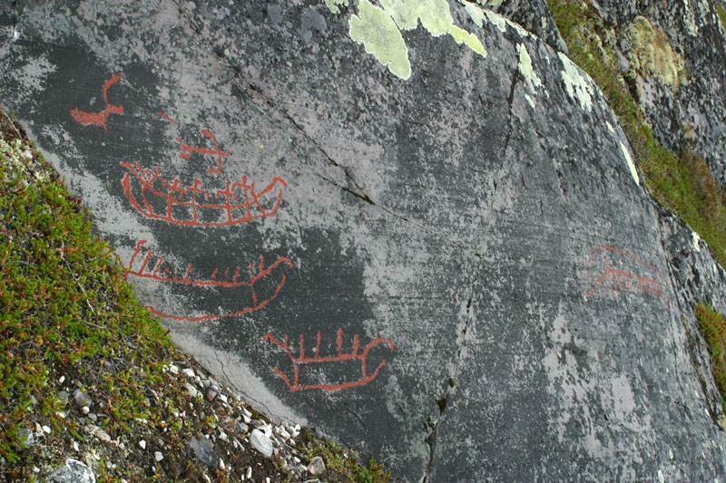 Ihmishahmo ja veneitä kalliopiirroksessa Altassa Norjassa.